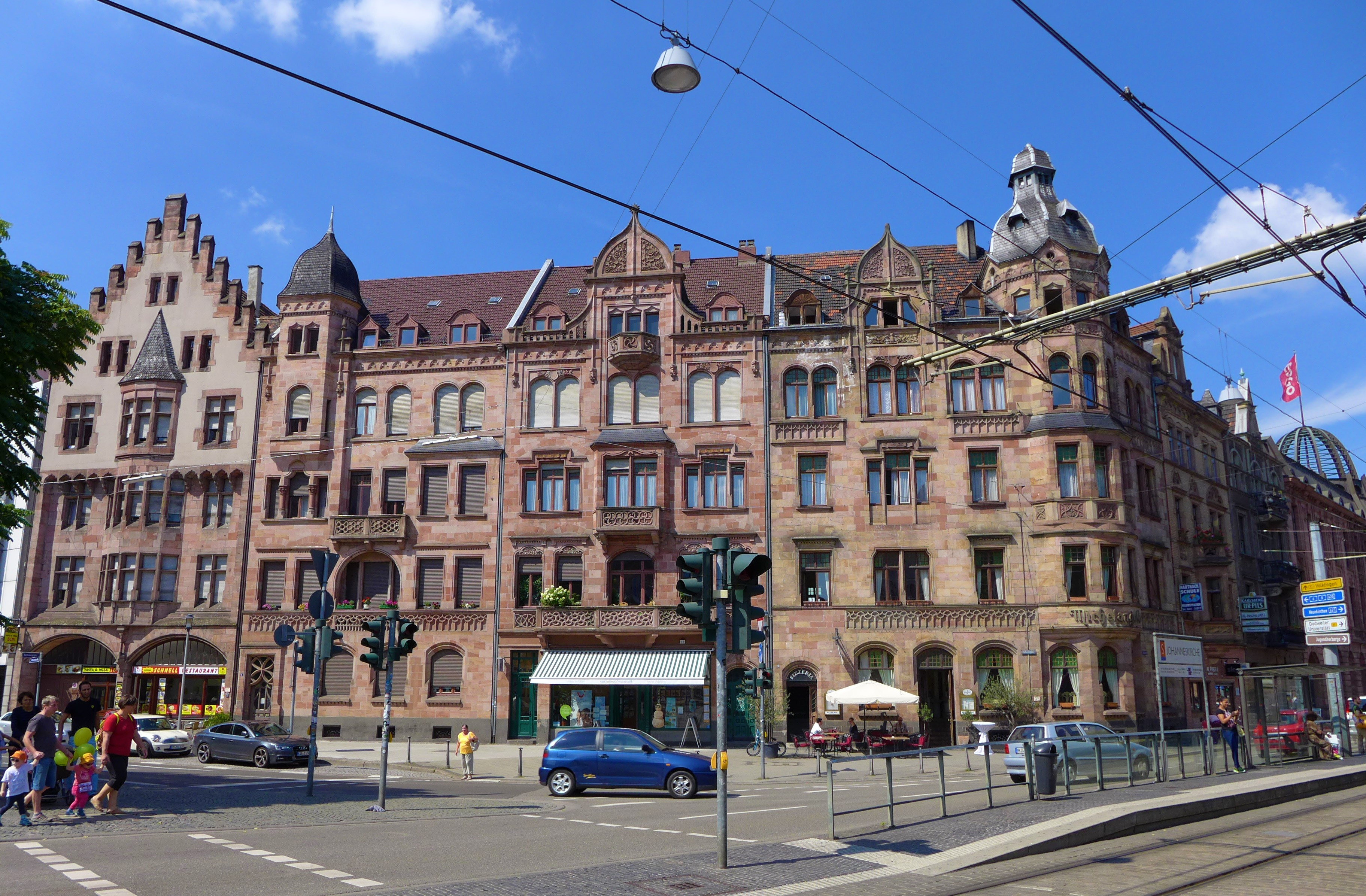 Häuserensemble Rathausplatz, Saarbücken-St. Johann